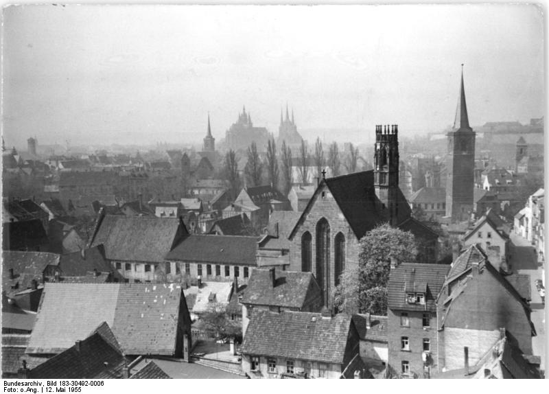 Erfurt, Blick auf die Altstadt Zentralbild TBD 12.5.1955 -2975- Erfurt, die Stadt des V. Parlaments der Freien Deutschen Jugend. Blick vom Johannisturm auf die Erfurter Altstadt. (Von vorn nach hinten) die Augustinerkirche mit dem ehemal. Augistinerkloster, der Turm der ehemal-. St. Nicolai-Kirche an der Lehmannsbrücke sowie Dom und Severi.